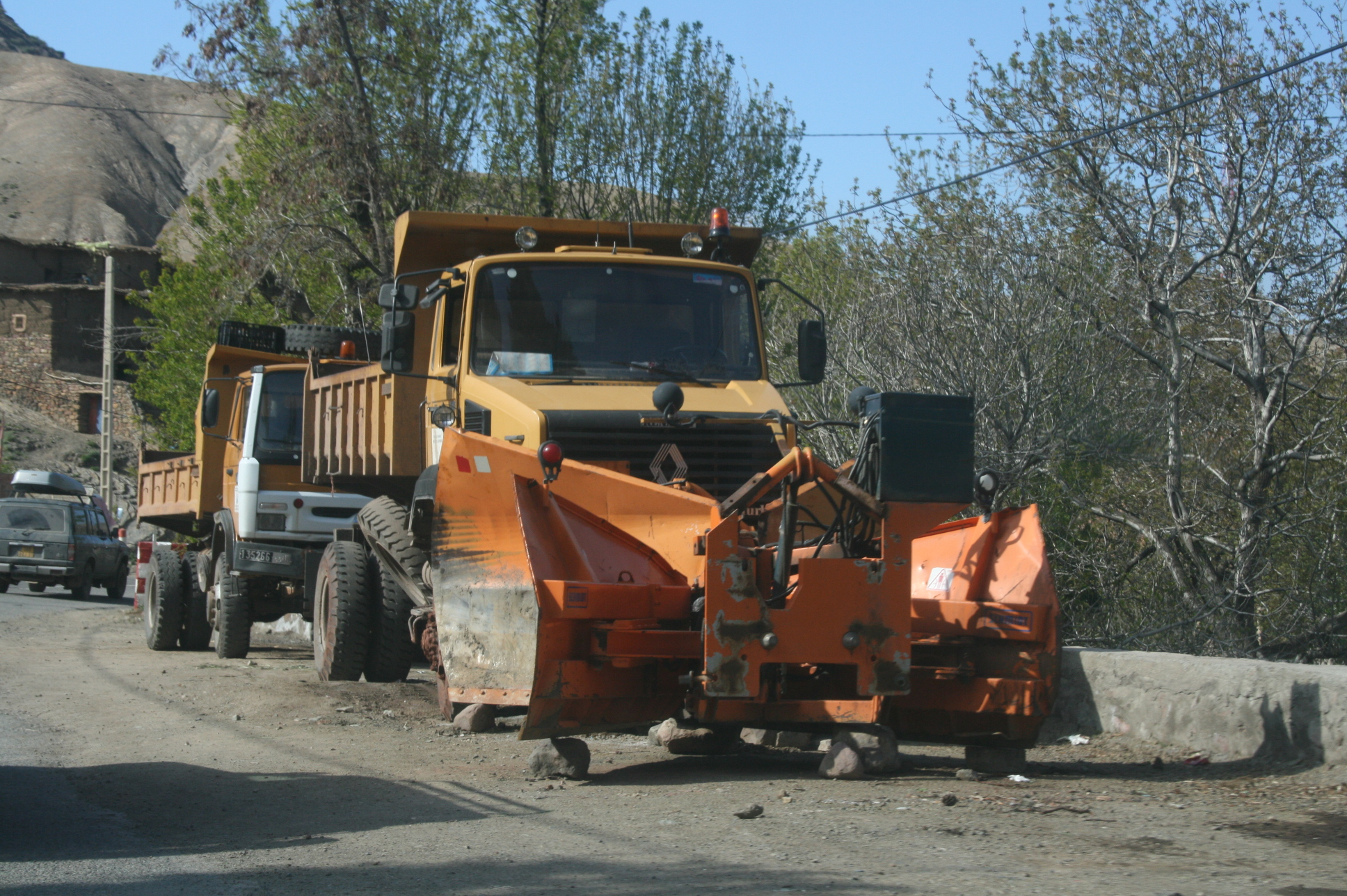 Camion équipé d'une étrave de déneigement - Moyen Atlas - Maroc